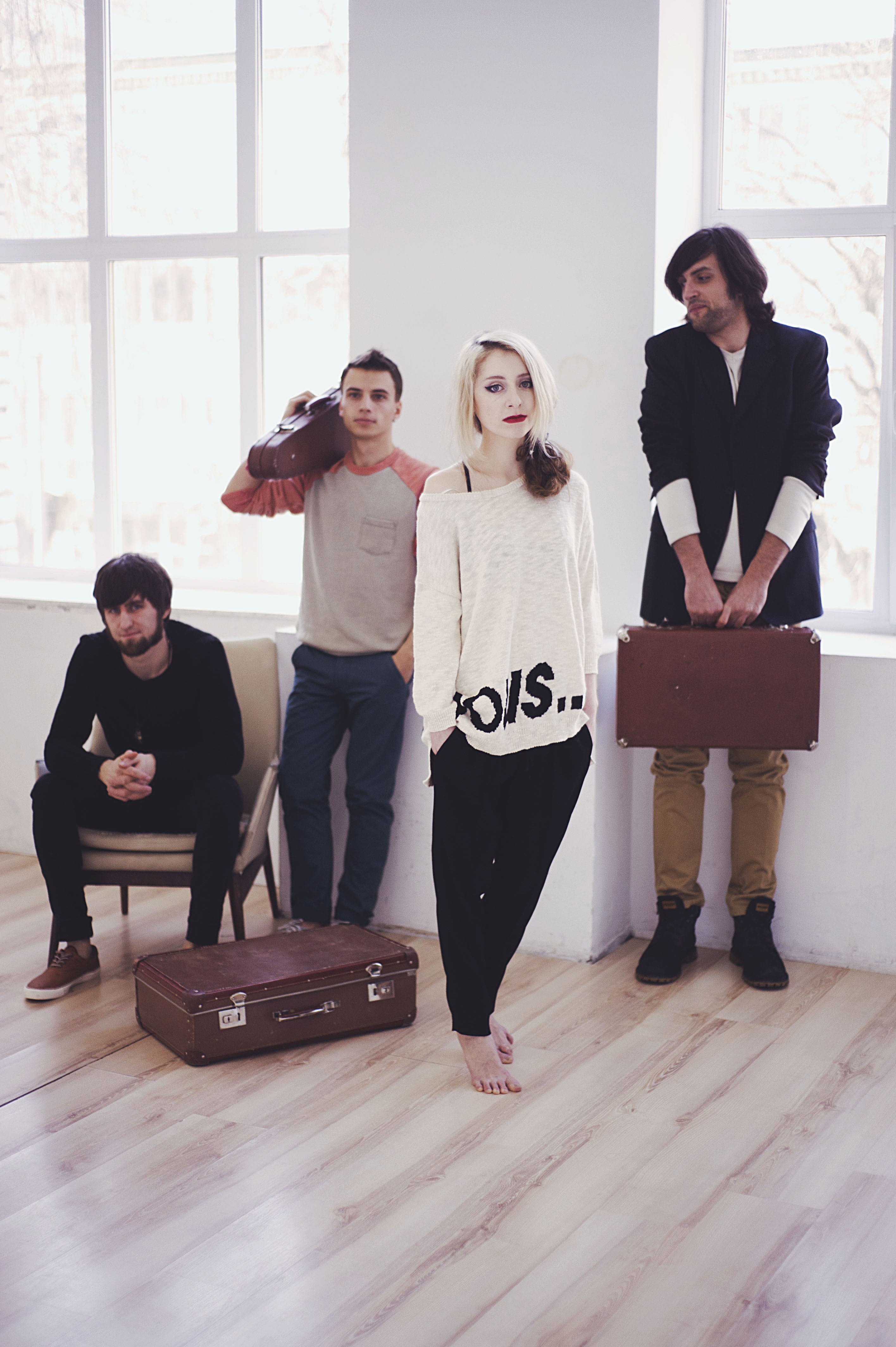 Vivienne Mort Photo: гурт Vivienne Mort